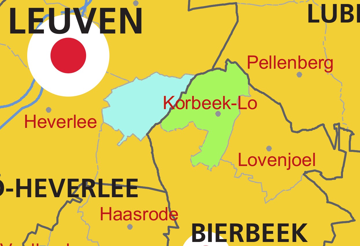 (Deel)gemeente Korbeek-Lo, en opsplitsing ervan sinds de fusie der gemeenten in de jaren '70. Groen: toegevoegd aan fusiegemeente Bierbeek (postcode 3360). Blauw: toegevoegd aan fusiegemeente Leuven (postcode 3000).